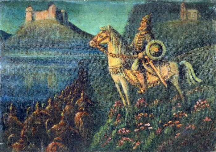 1944 г. Матэр'ял і тэхніка палатно, алей Памеры 67 х 96,5 Месцазнаходжанне Музей старажытнай беларускай культуры Інстытута мастацтвазнаўства, этнаграфіі і фальклору НАН Беларусі